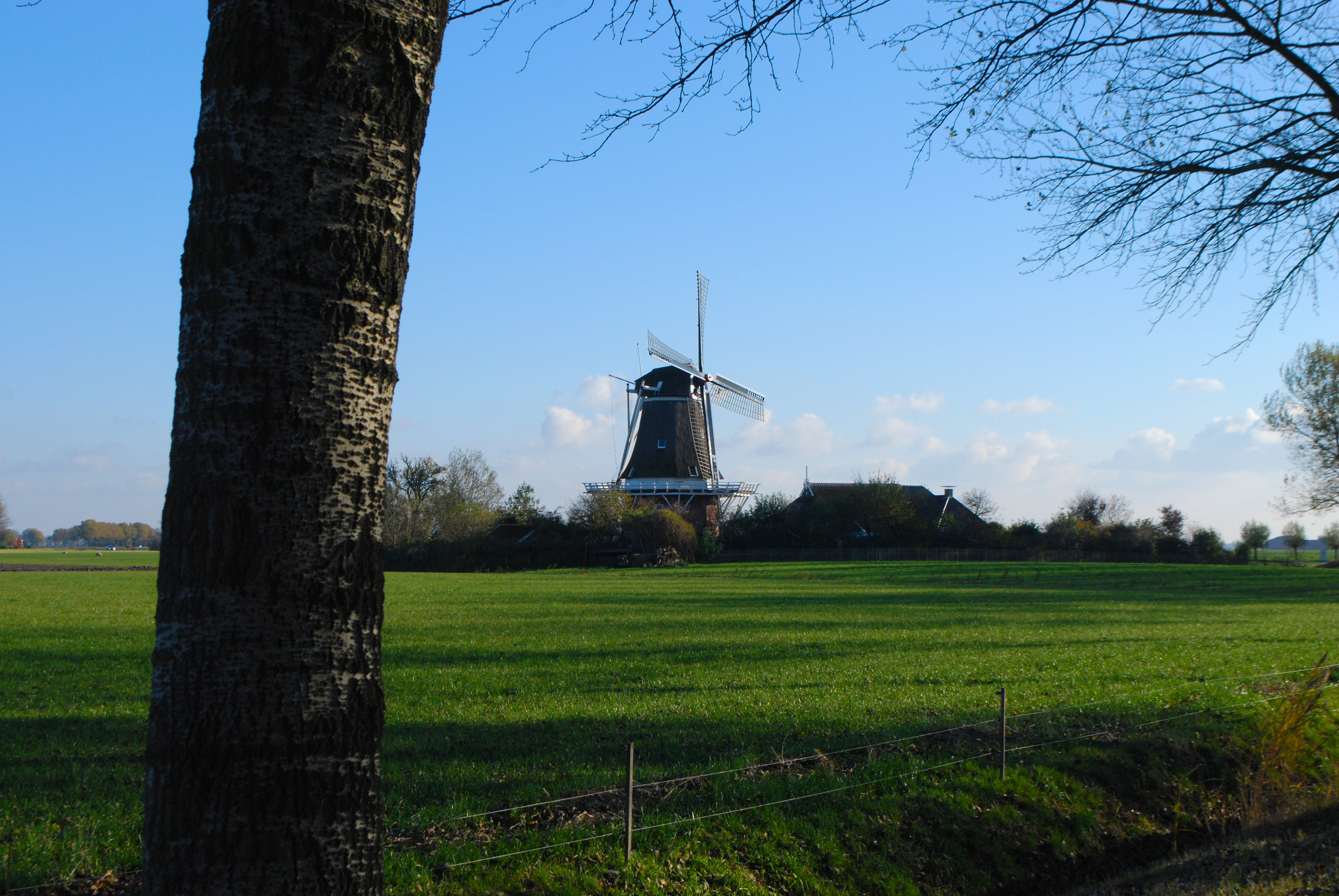 Een foto van De Hond genomen door Mika Zuidnga